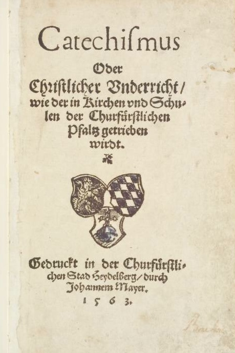 Heidelberger Katechismus, Druck 1563